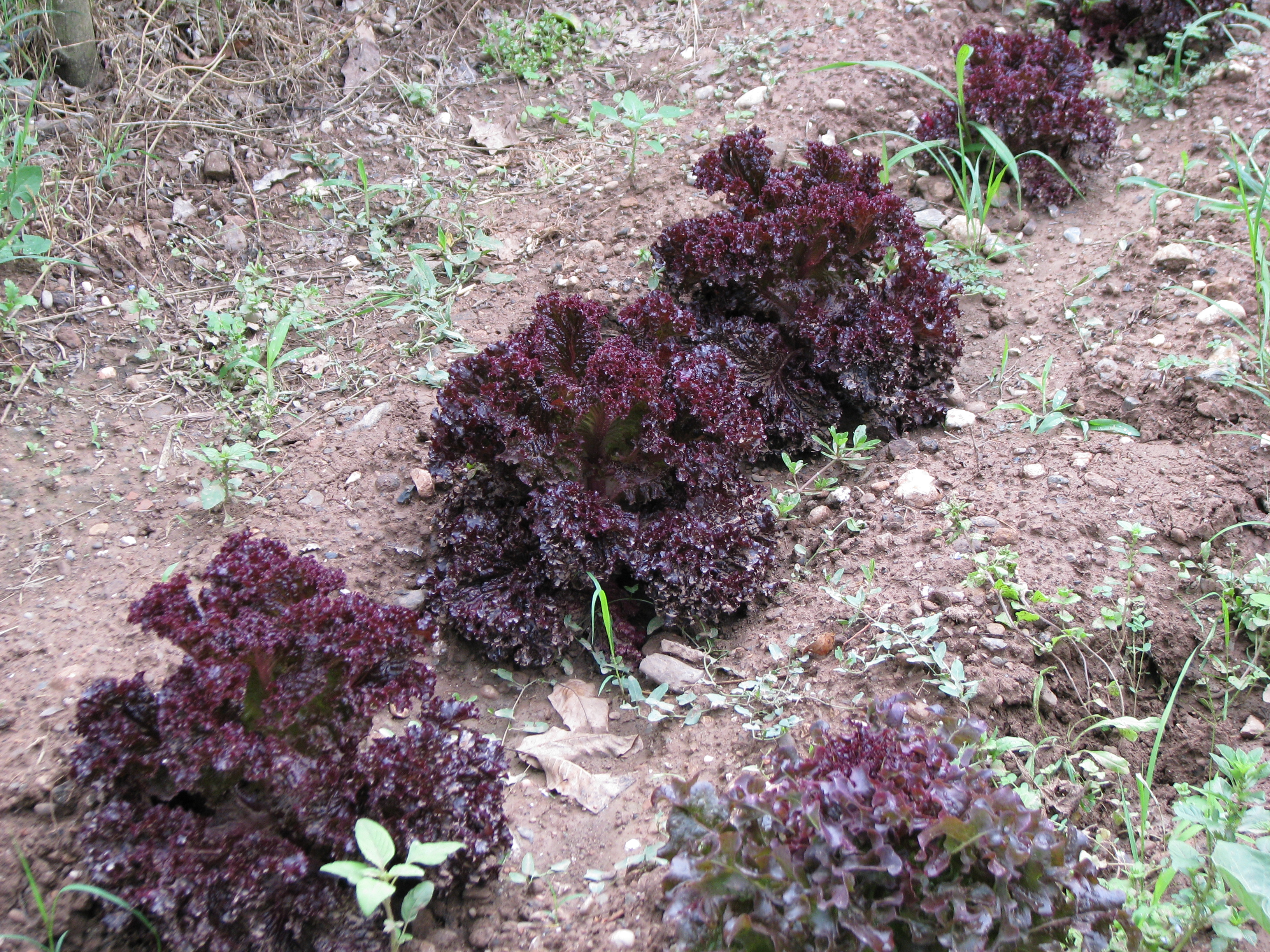 Enciam de fulla de roure a Mura.